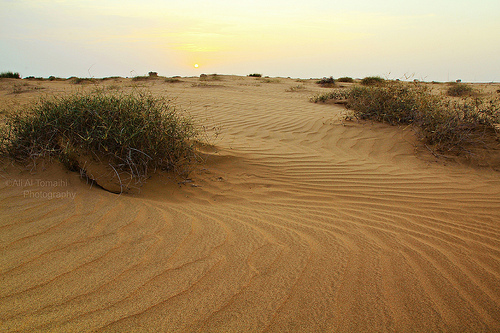 .مناظر من ديار بني الطمح جنوب غرب المملكة العربية السعودية